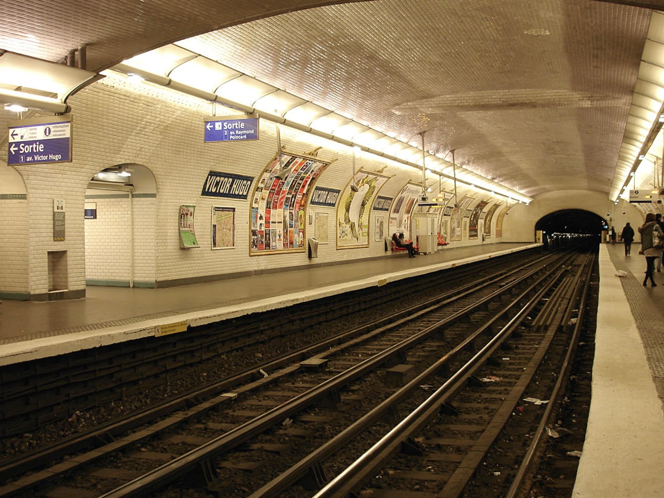 Station Victor Hugo de la ligne 2 du métro de Paris, France.